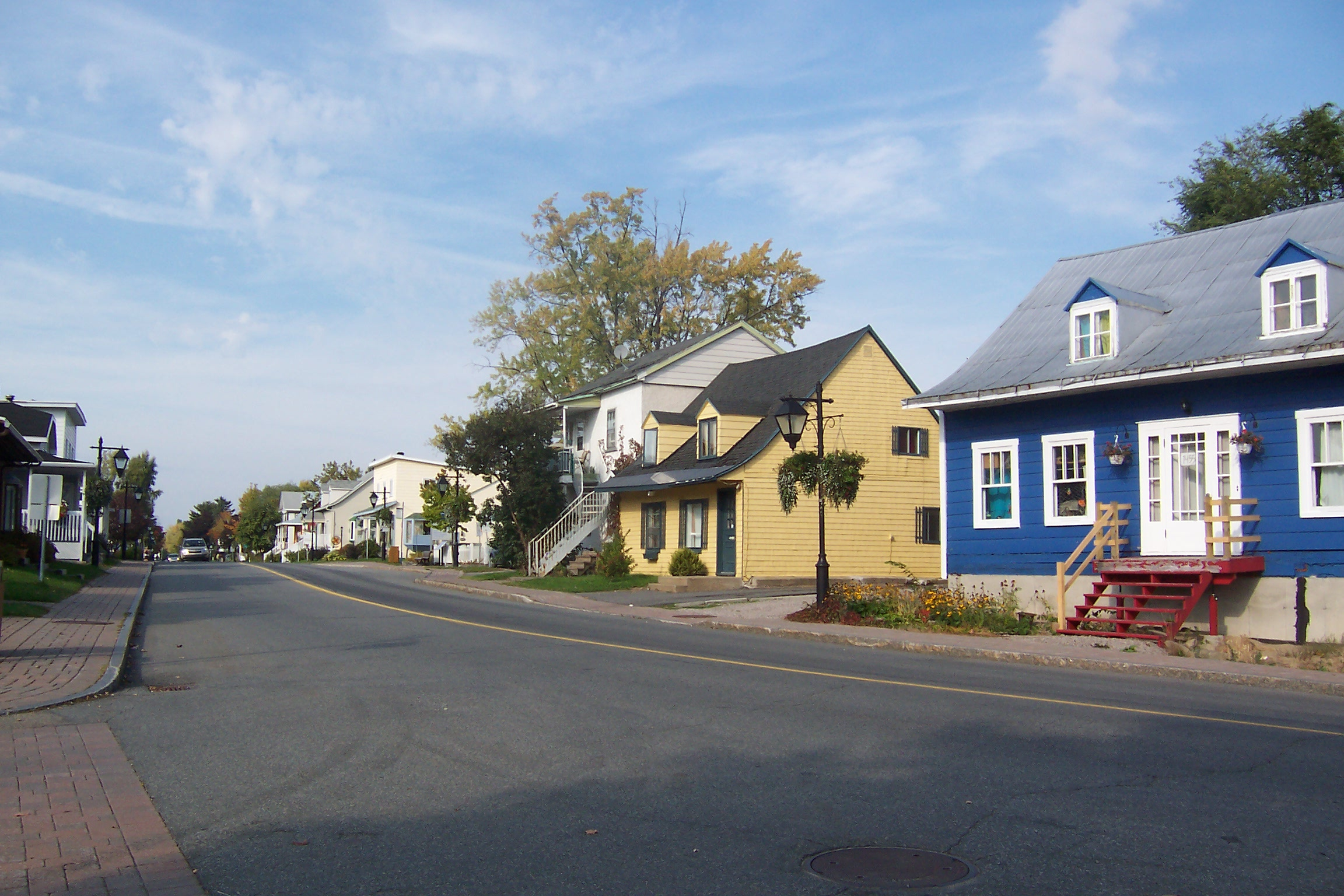 Maisons de la rue Provancher, plus vieille rue de Cap-Rouge, Québec